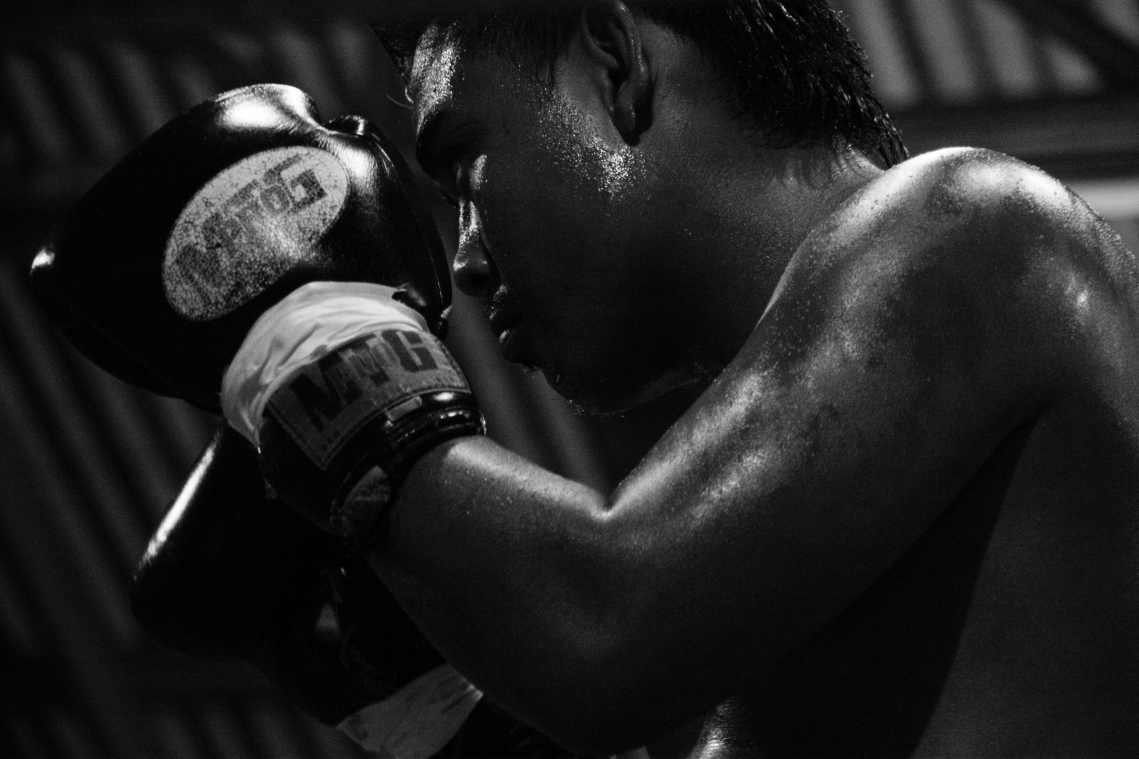 Thai Boxing in Lamai - Koh Samui